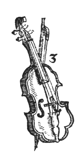 Diskantgeige oder auch Violino piccolo, Quelle: Syntagma musicum, Public Domain